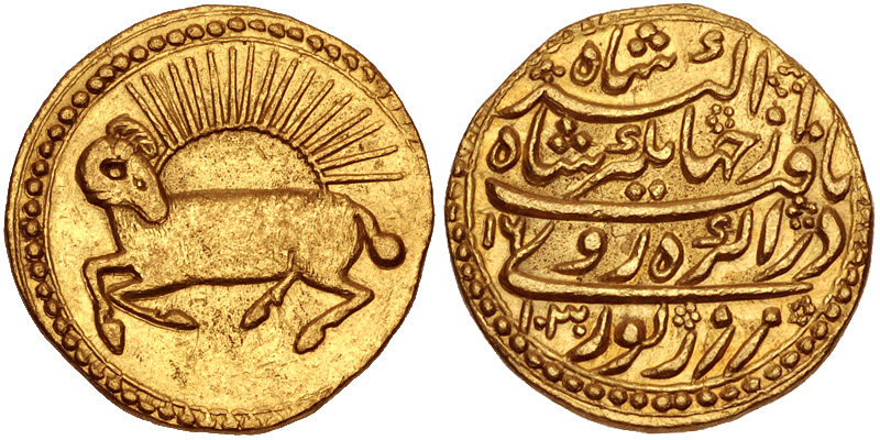 خورشید در برج حمل؛ سکه جهانگیر شاه